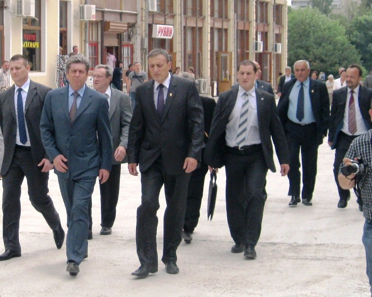 Президентът на Република България, г-н Георги Първанов, като гост на празника на Попово - 10.06.2011 г.